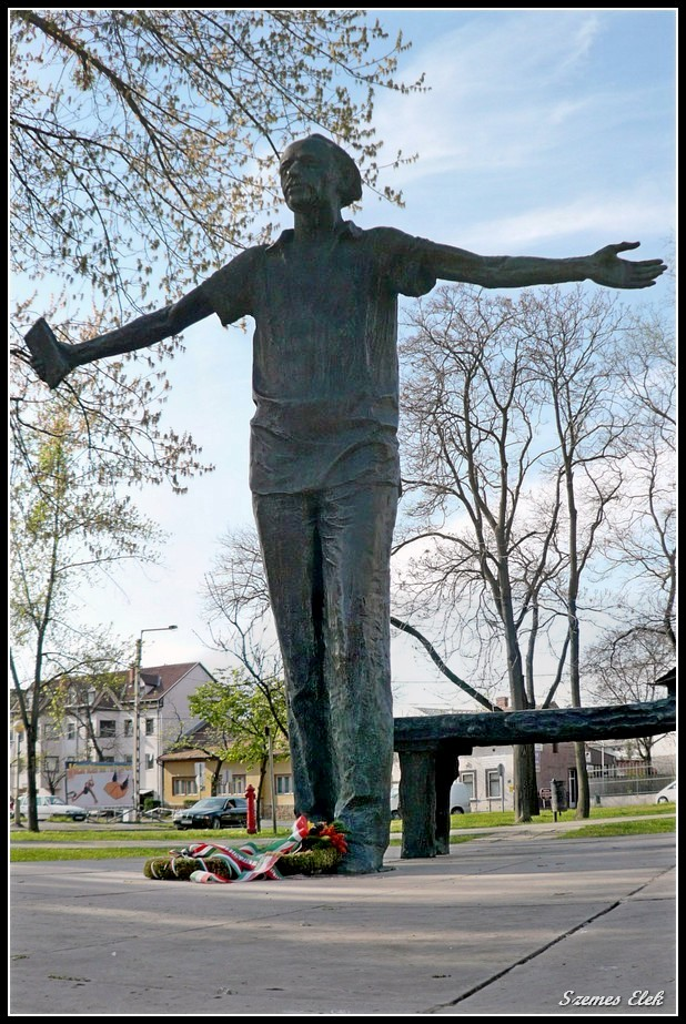 Nyíregyháza, Hungary